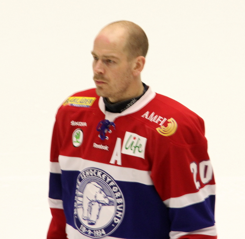 Anders Bastiansen, norsk ishockey spiller.